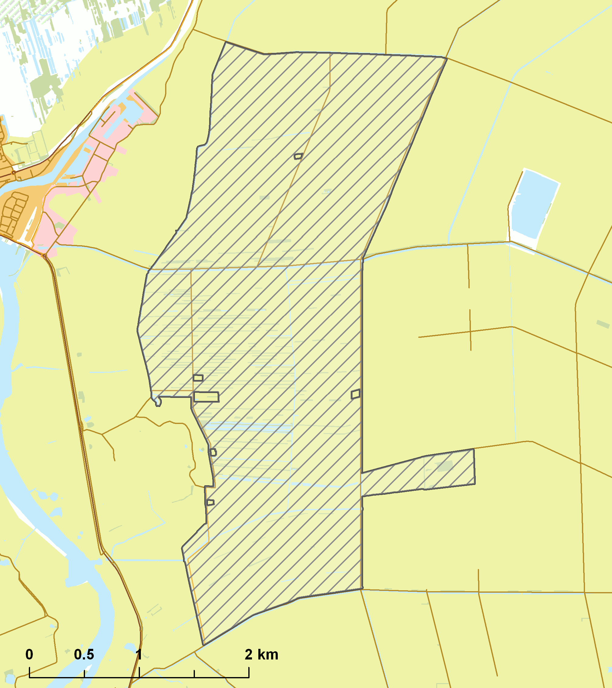 Natura2000 - Olde Maten & Veerslootslanden.png